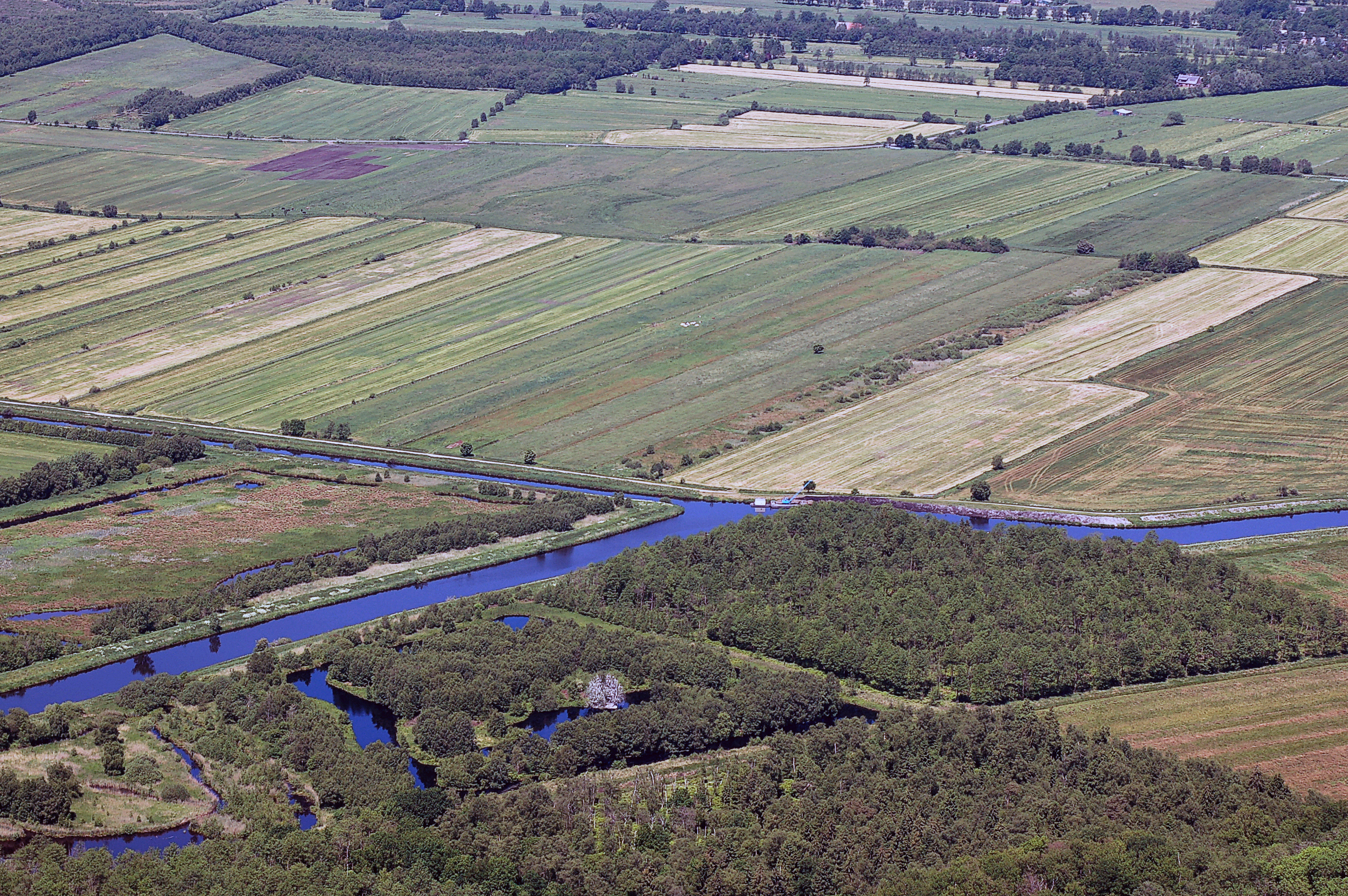 Hadelner Kanal, Einmündung des Flögelner Seeabflusses. Im Vordergrund Teile des Naturschutzgebietes „Holzurburg am Bederkesaer See“. Luftbilder von der Nordseeküste 2012-05